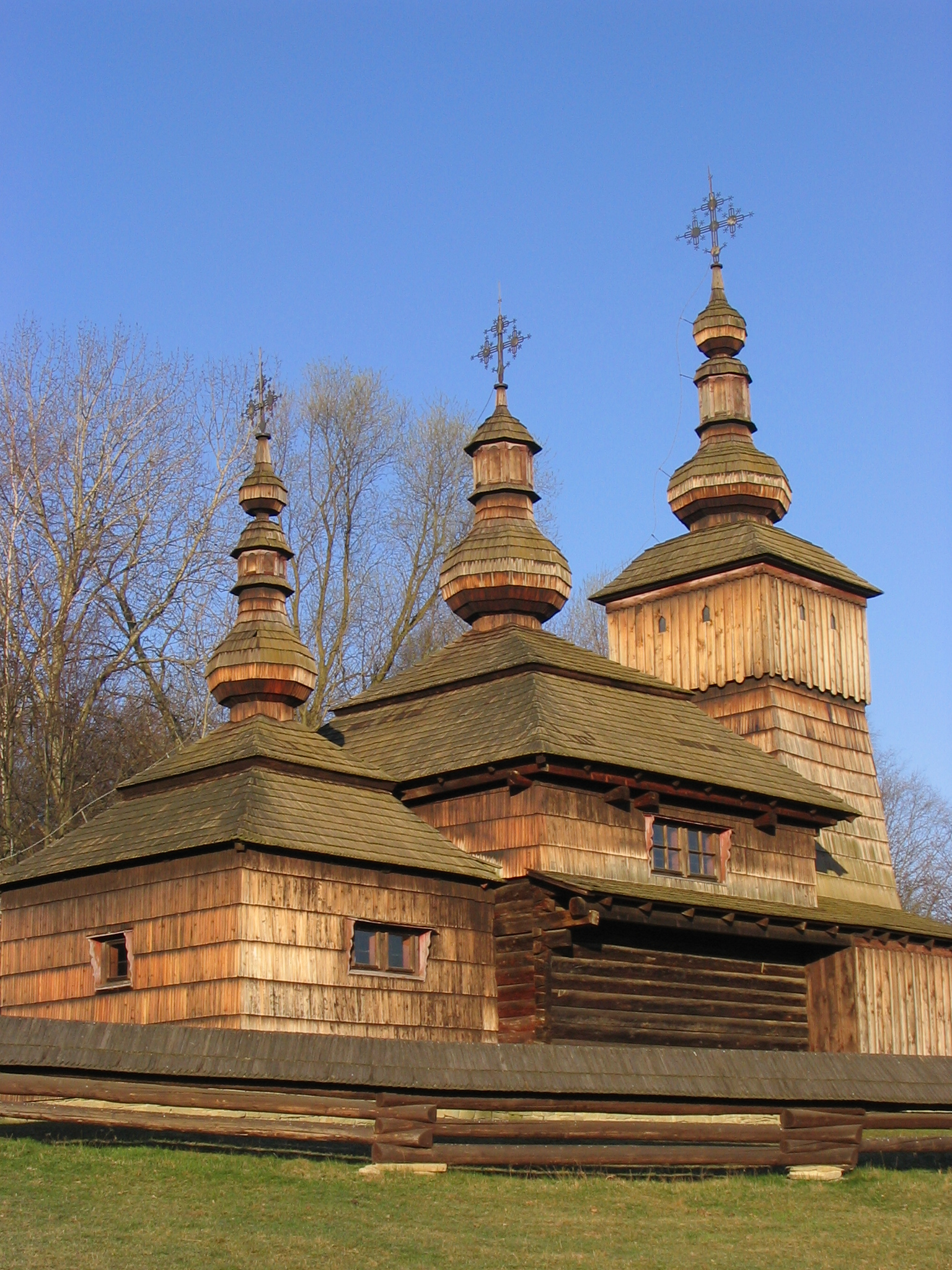 Nova Polianka drevena cerkov